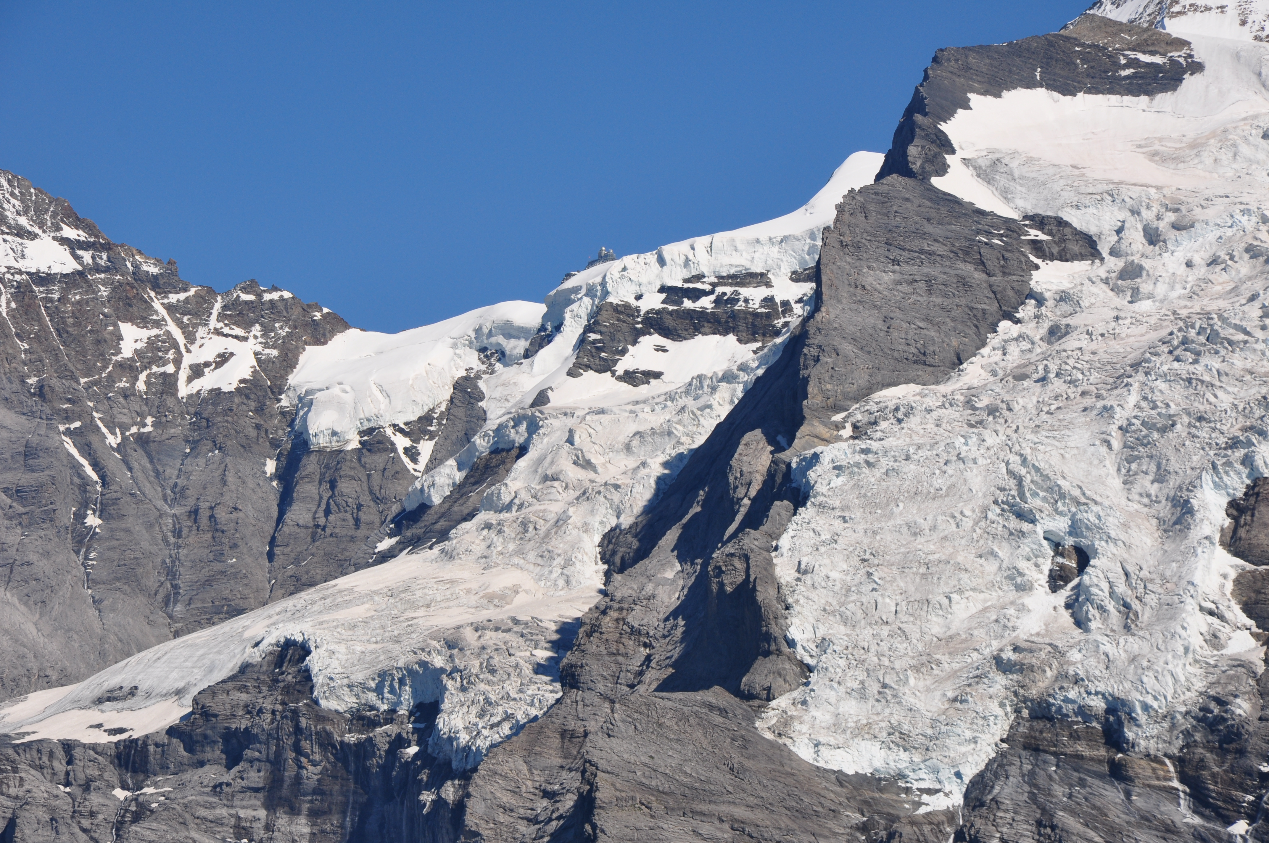 Switzerland, Canton of Bern, Jungfraujoch and Guggi Glacier